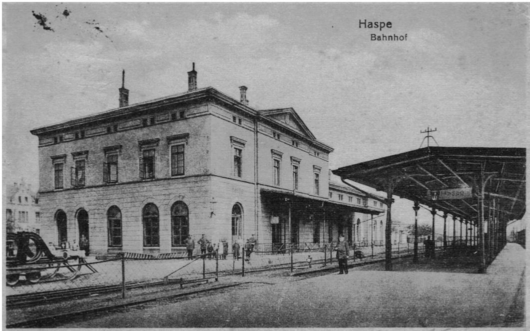 Bahnhof Haspe (um 1925) der Bergisch-Märkische Eisenbahn-Gesellschaft (BME)